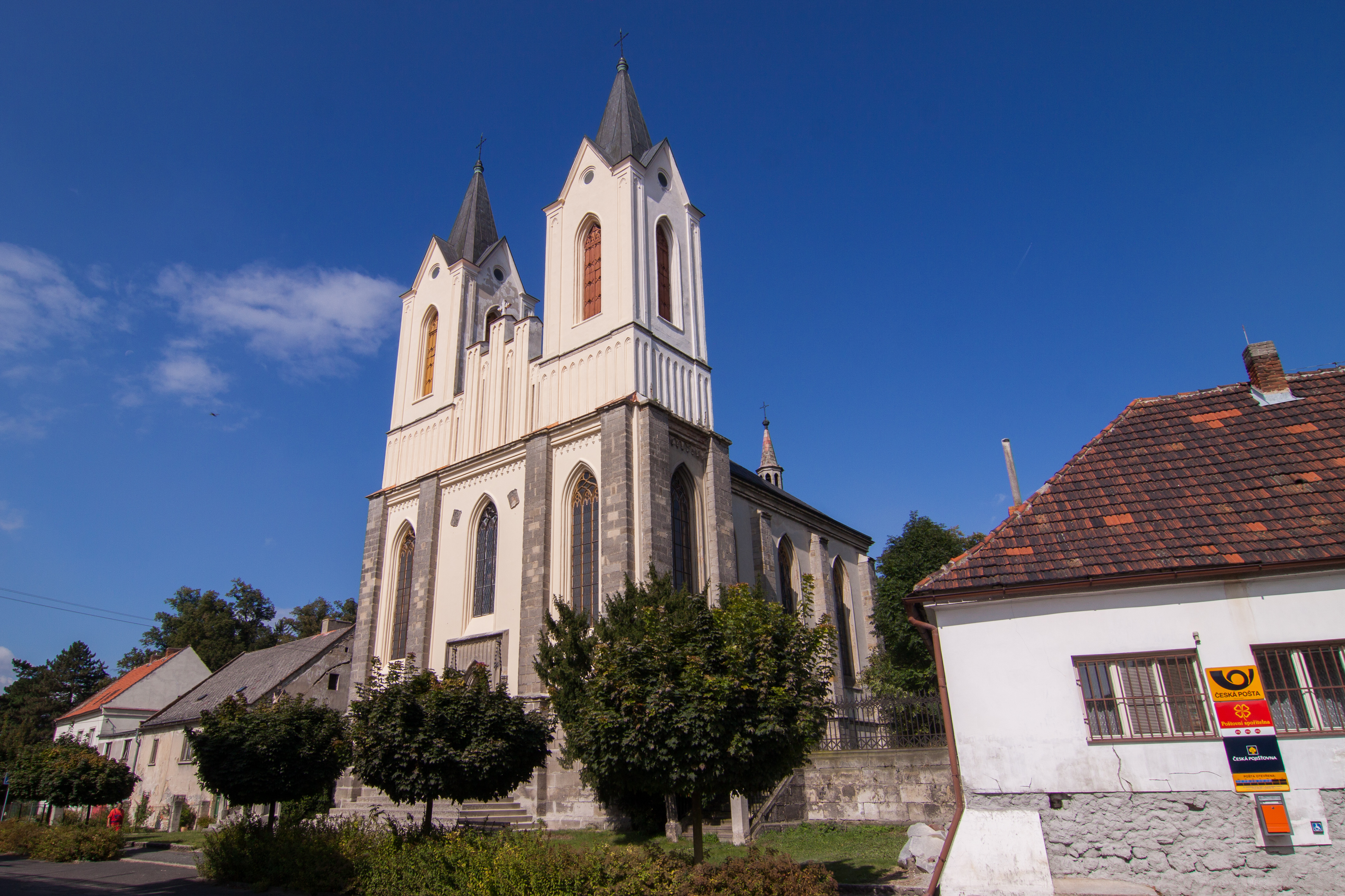 Kostel P. Marie Vítězné, Řepín